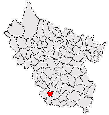 Categorie:Hărţi ale judeţului Buzău